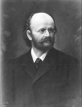 Prof. Bernhard von Kugler (Tübinger Professorengalerie)